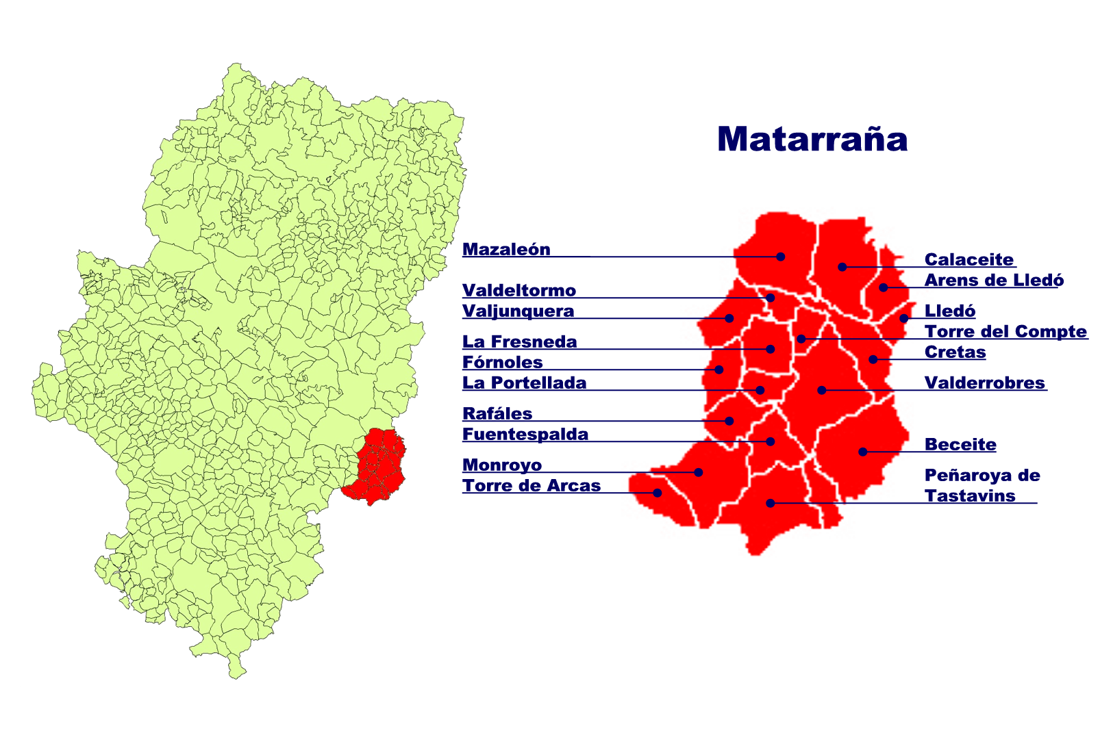 Comarca del Matarraña Creado el 02.09.2005 por Ecelan en base a Image:Aragon municipalities.png